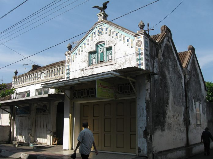 Toko Aneka Jaya adalah bangunan cagar budaya yang terletak di Jalan Semeru No. 20, Kelurahan Kalicacing, Kecamatan Sidomukti, Kota Salatiga, Provinsi Jawa Tengah. Rumah toko ini merupakan salah satu bukti fisik yang mewakili kawasan pecinan di Kota Salatiga pada masa pemerintahan gemeente (kotapraja). Kondisi fisik bangunan rumah toko tersebut kurang terawat pada 2020, tetapi bentuk depannya masih asli dengan ciri khas bangunan kolonial.